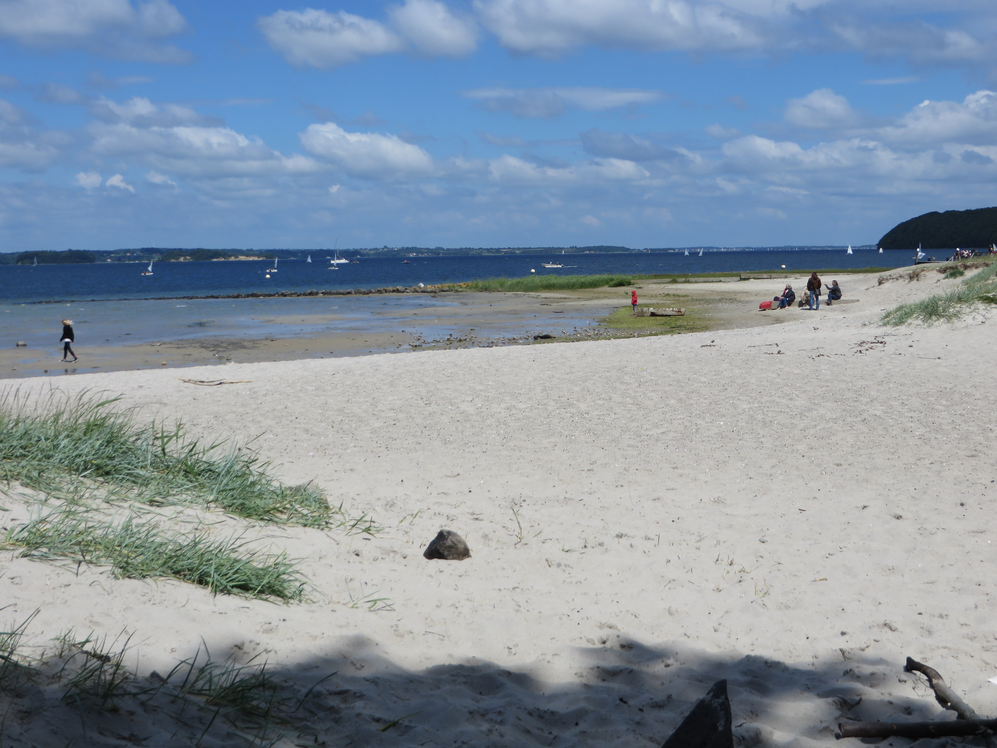 Solitüder Strand zum Sommer hin (Flensburg-Mürwik am 20. Juni 2015), Bild 006